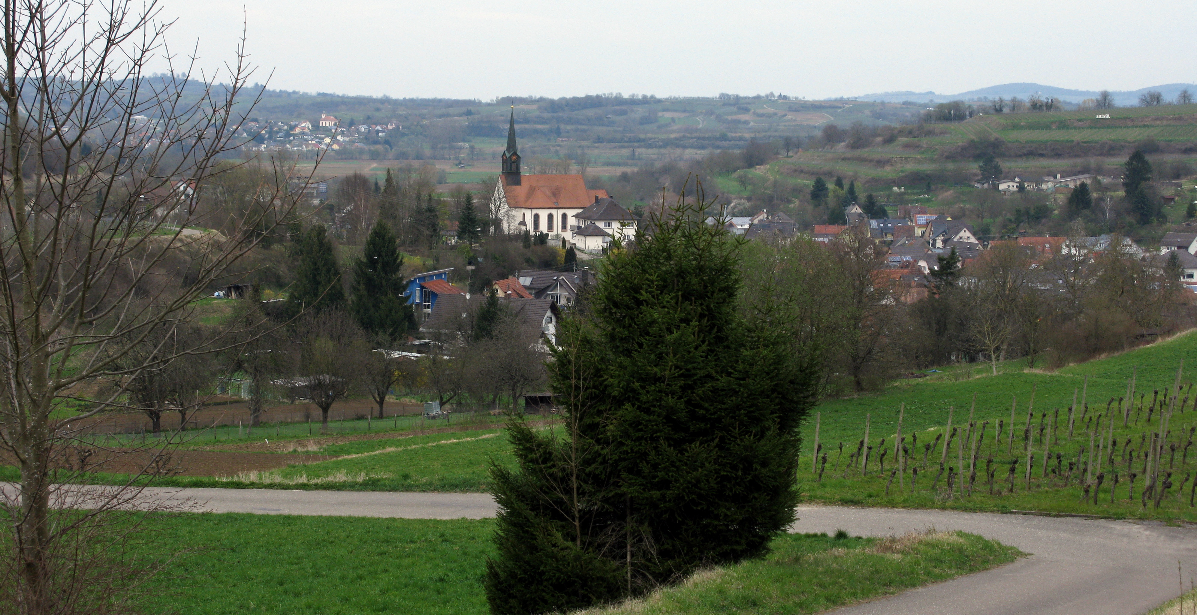 Blick auf Nordweil